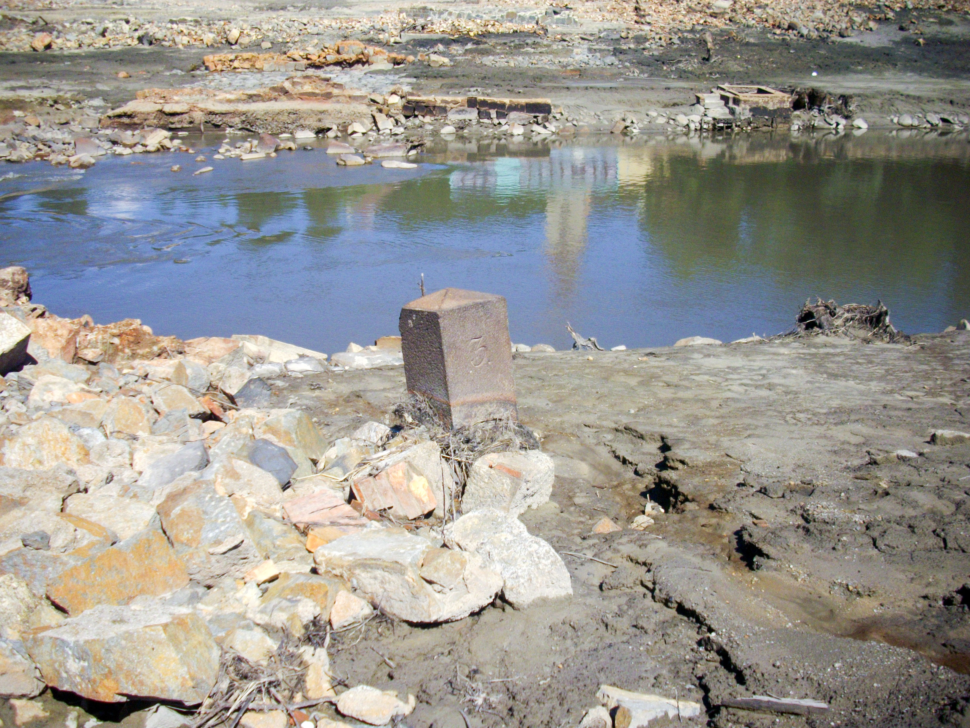 Grenzstein GS 3 KS/KP Sächsischer Grenzstein Nr. 3 am 20.08.2010